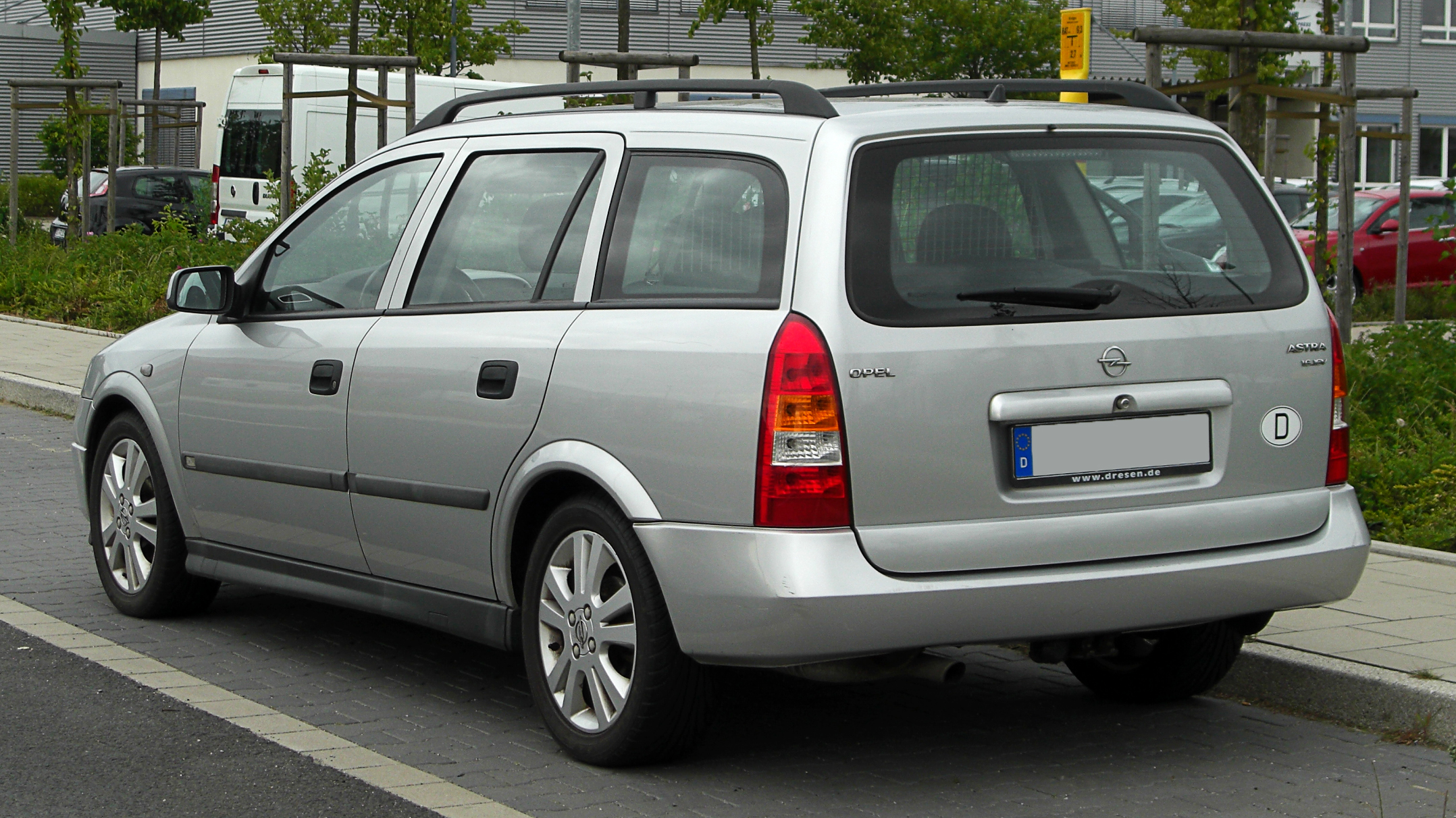 Opel Astra Caravan 1.6 16V Selection (G)